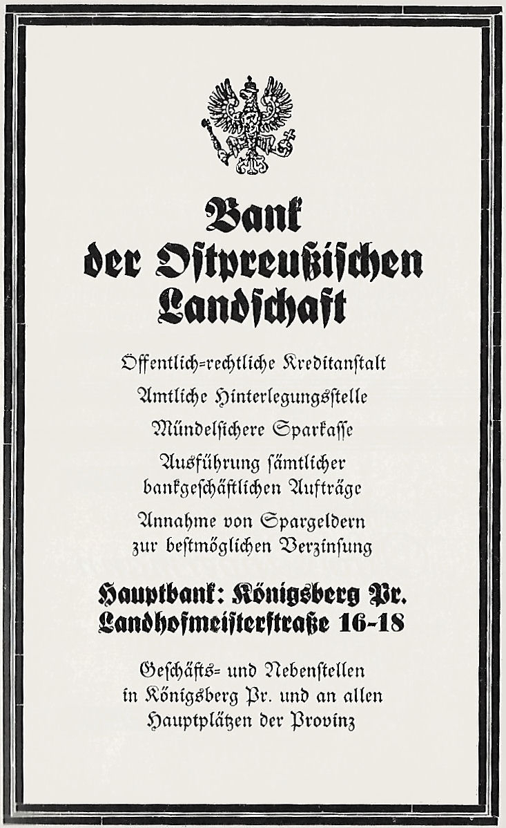 Werbung der Bank der Ostpreußischen Landschaft